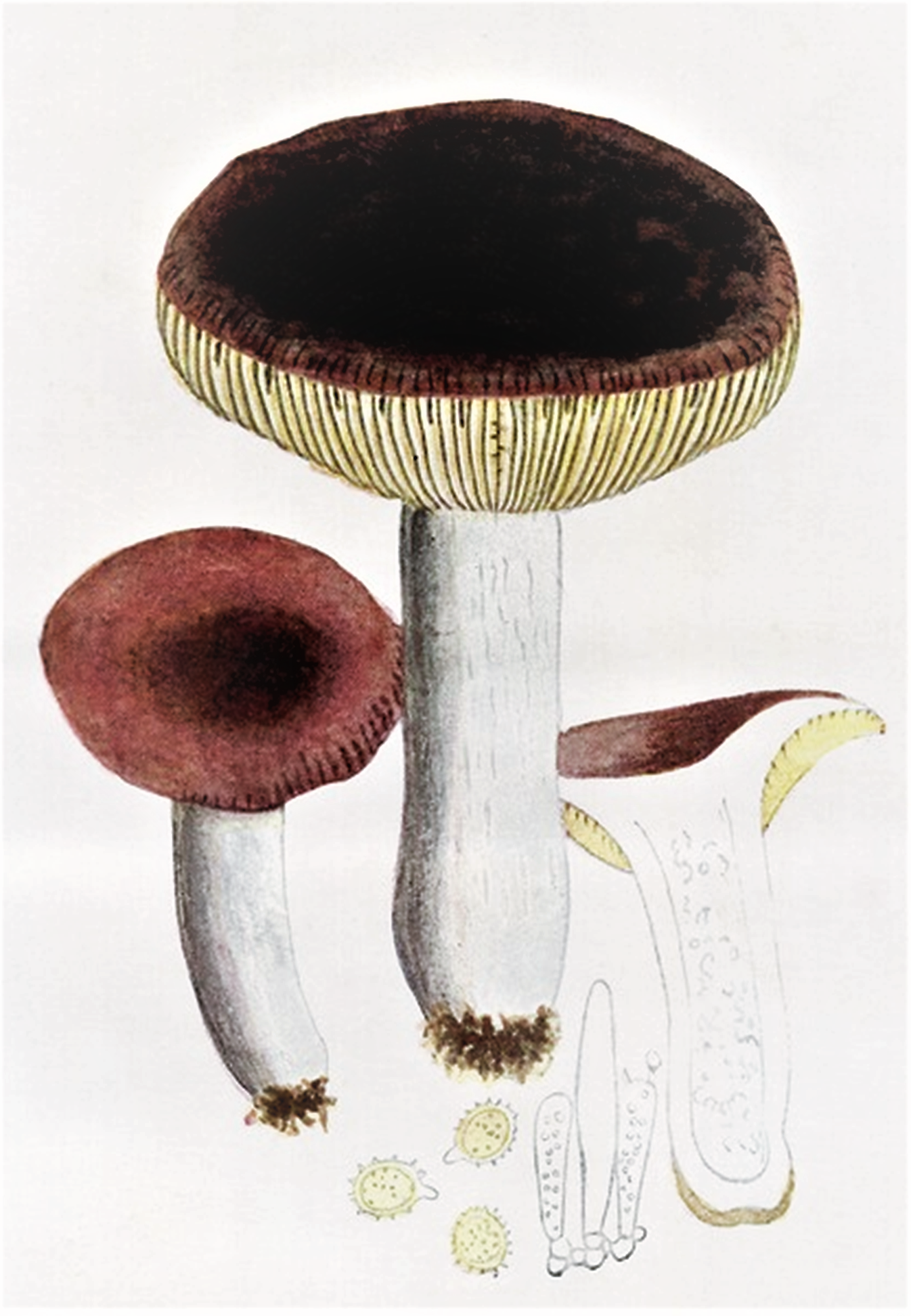 Giacomo Bresadola: Russula integra (L., 1753) Fr. (1838)